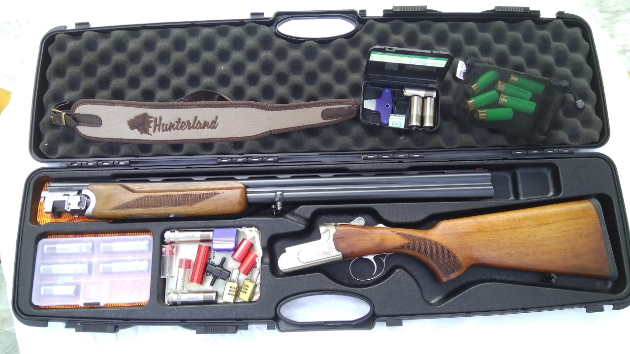 اسلحه ساچمه زنی دولول سوار شاهین ساخت ایران